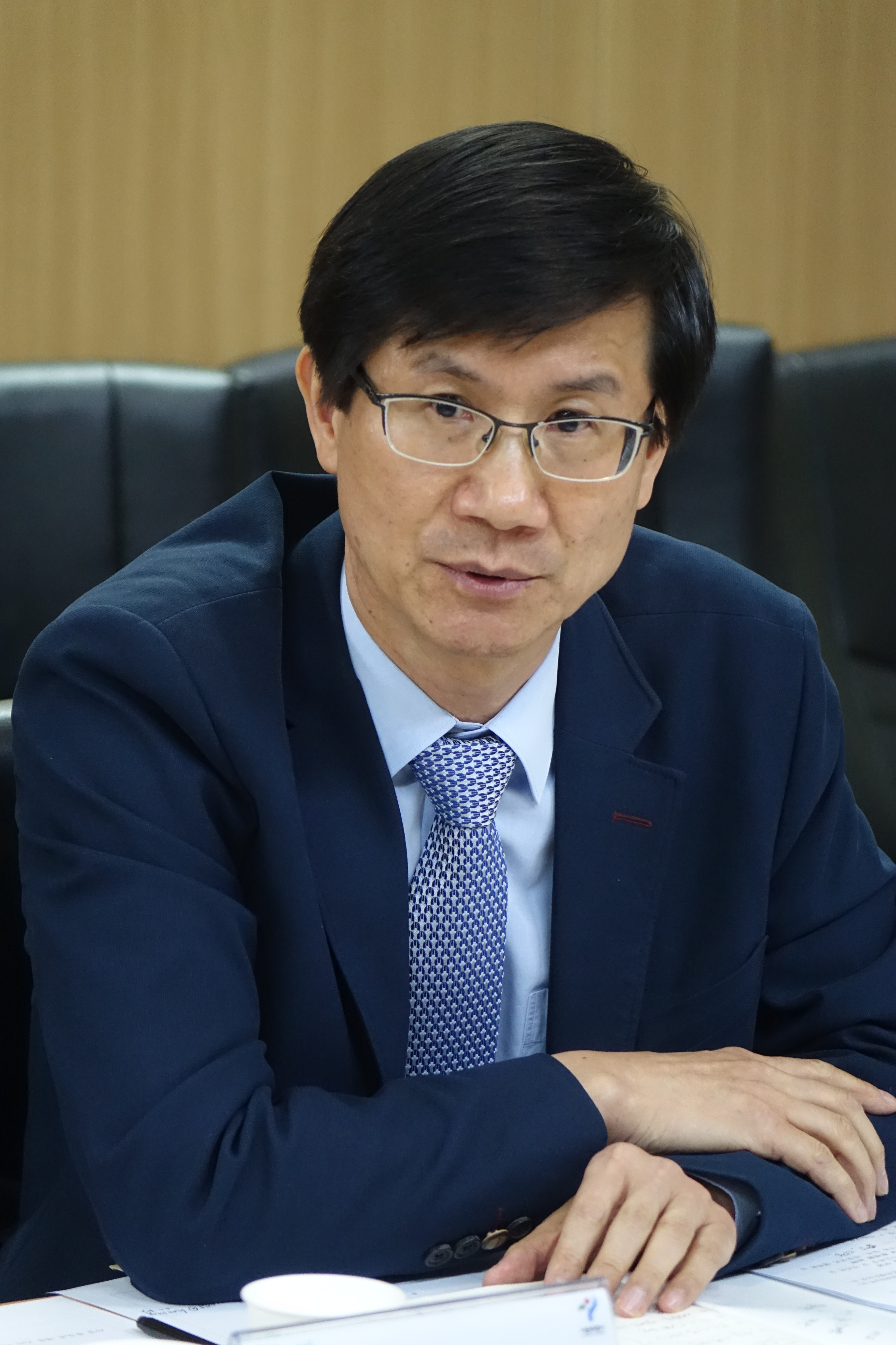 박두용, 2015년 4월 서울특별시 중구 서울소방재난본부 시민안전파수꾼 자문위원 회의